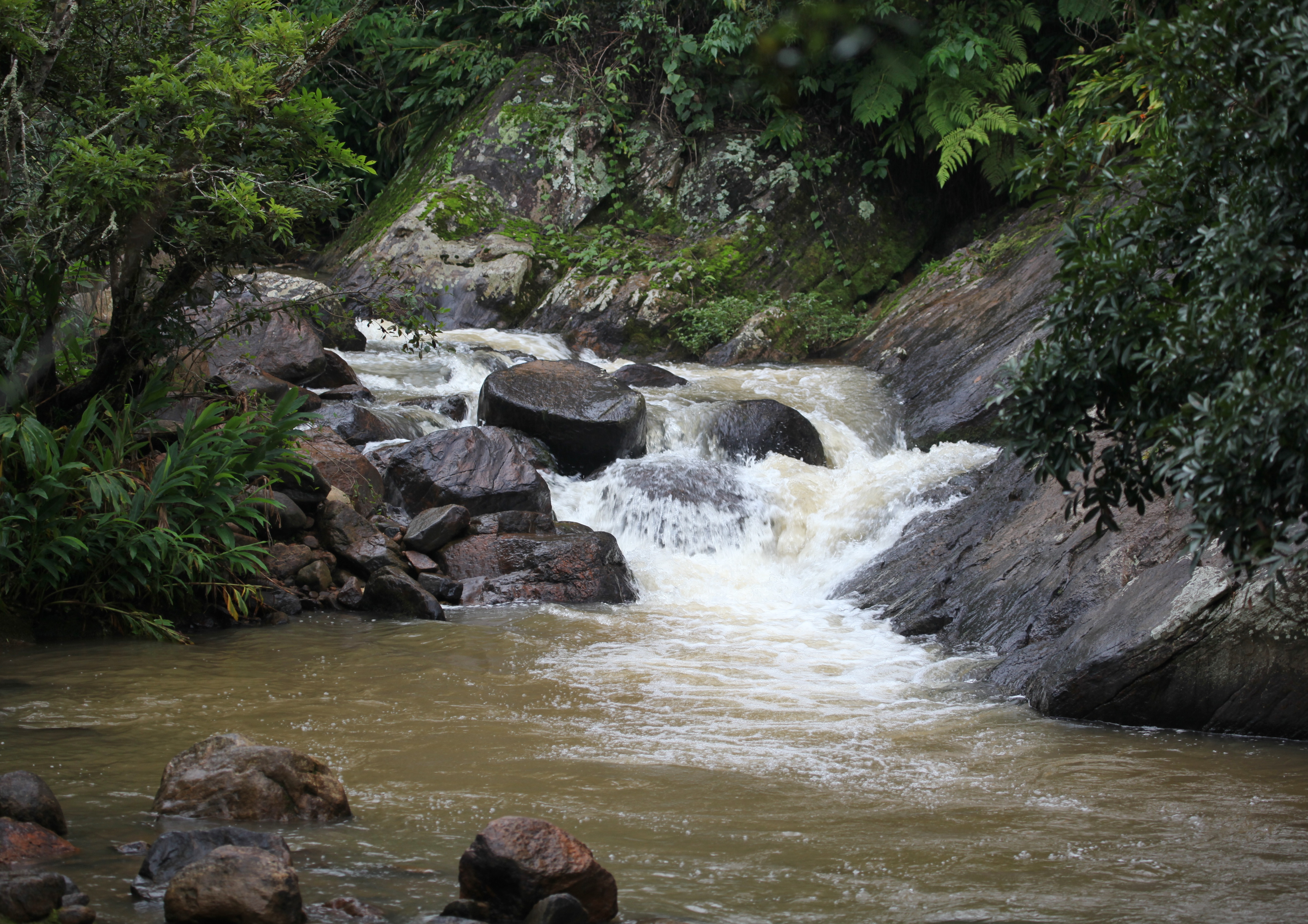 Cachoeira em Mata Atlântica, Cambuí, MG, Brasil